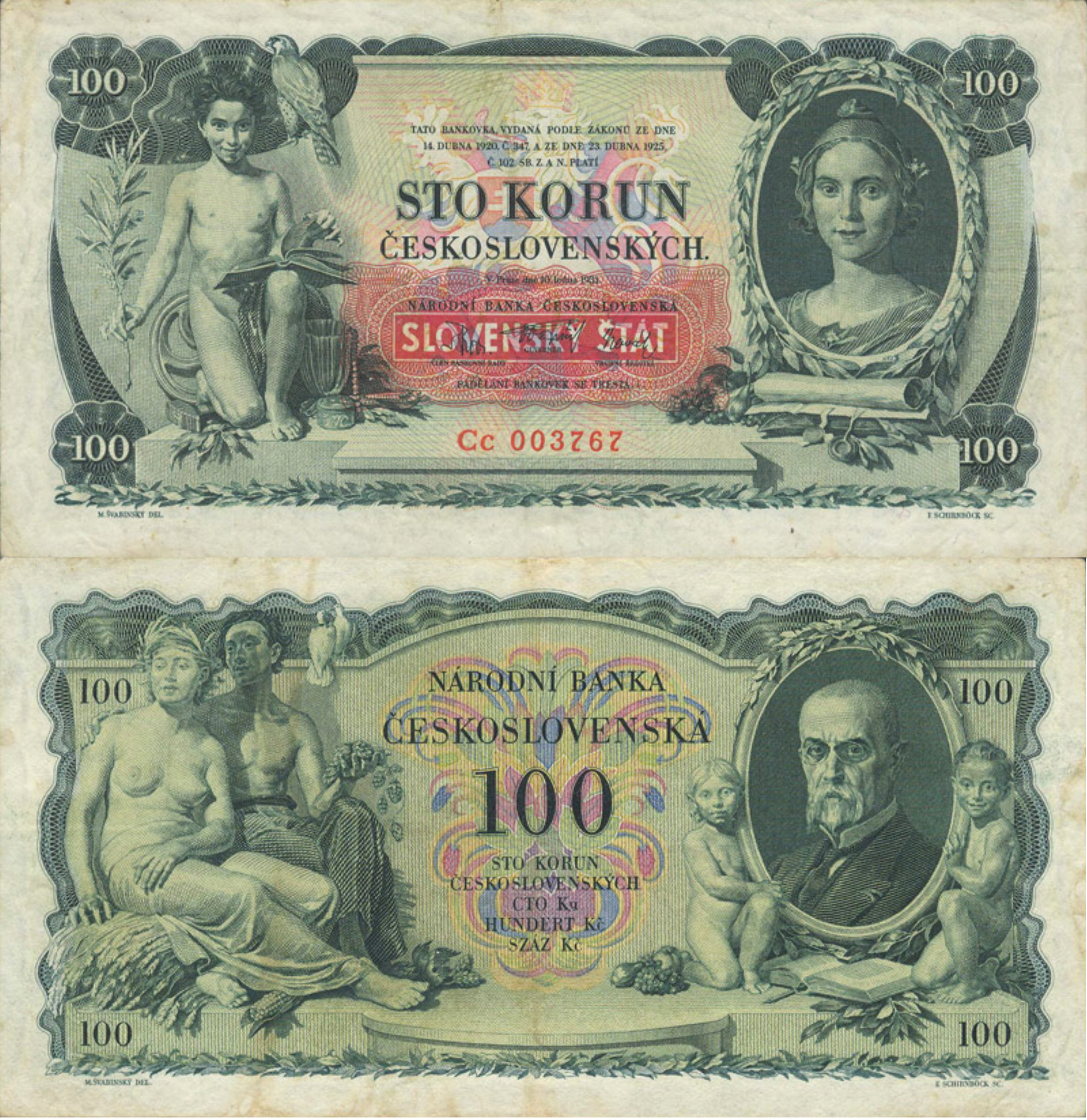 Czech. 100 Korun-Note mit Überstempelung „Slowak. Staat“ April 1939.